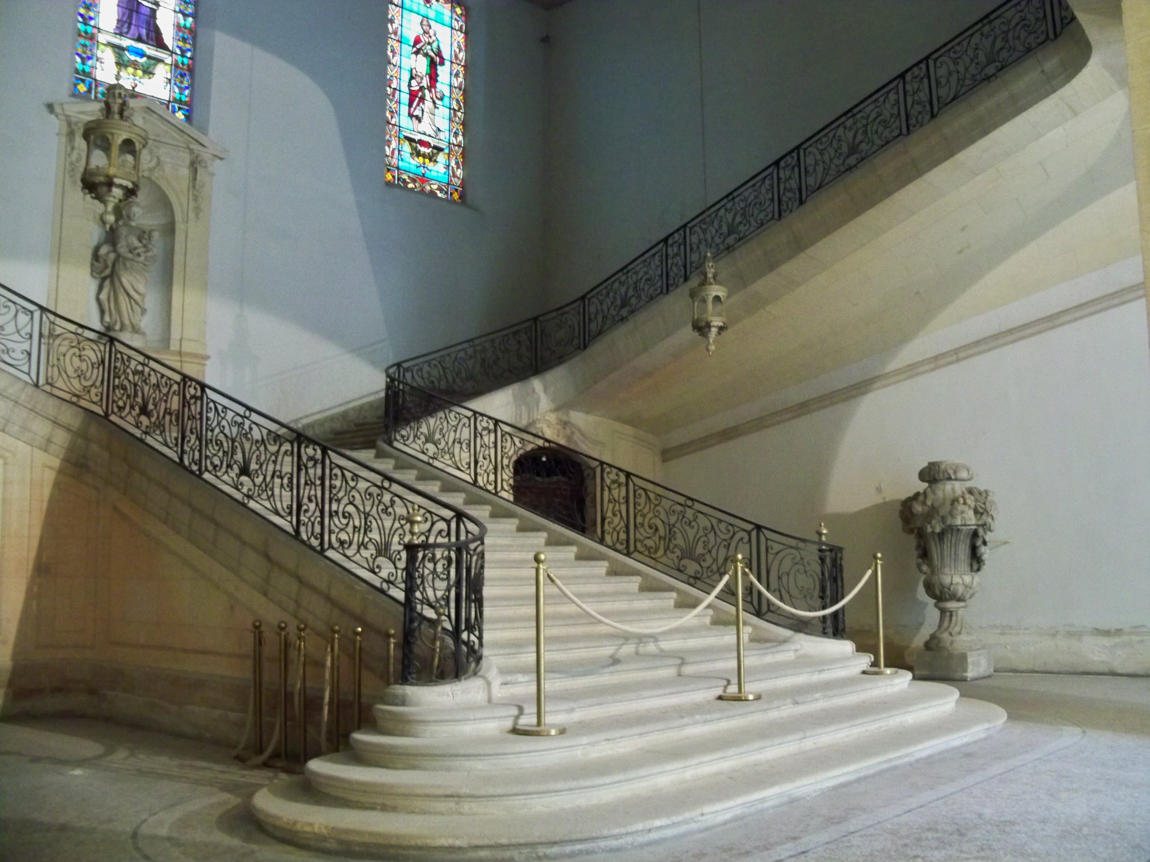 Hôtel-Dieu de Carpentras (Vaucluse, France), escalier du hall d'honneur dont la rampe en fer forgé est classée M.H.